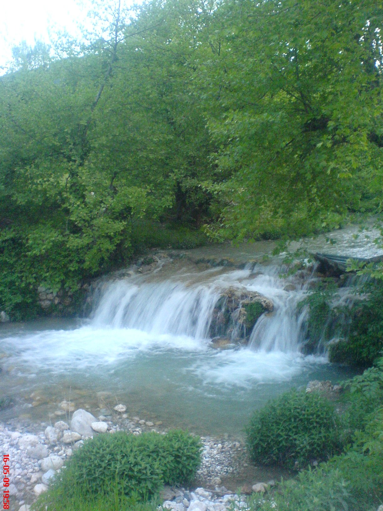 elmalı